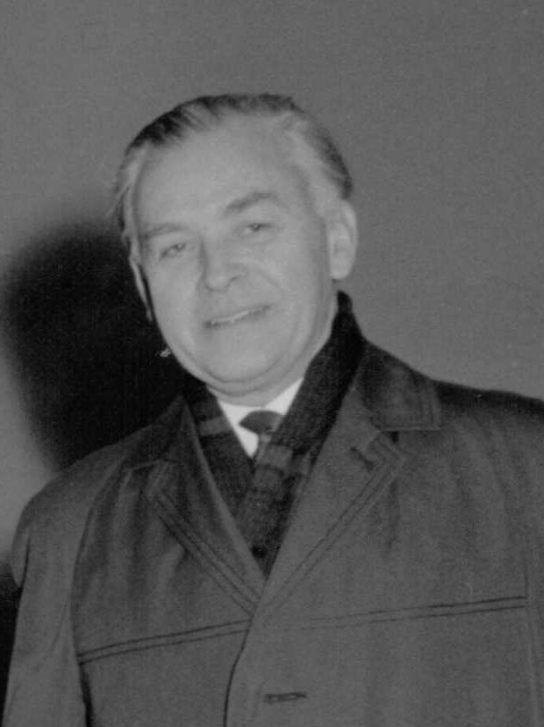 Wolfgang J. Müller (1913-1992), deutscher Kunsthistoriker, Professor der Christian-Albrechts-Universität zu Kiel